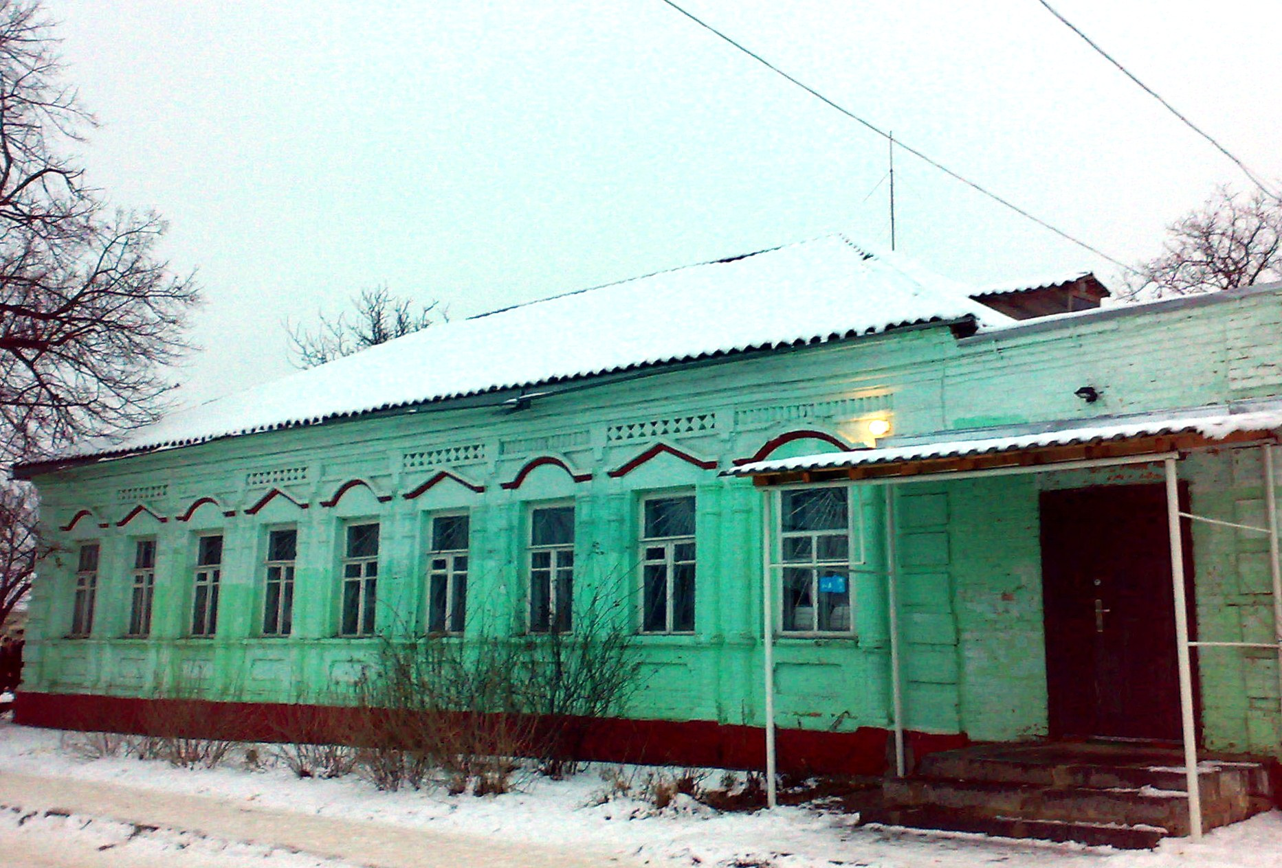 Земський банк у Златополі (Новомиргород, Кіровоградська область, Україна)